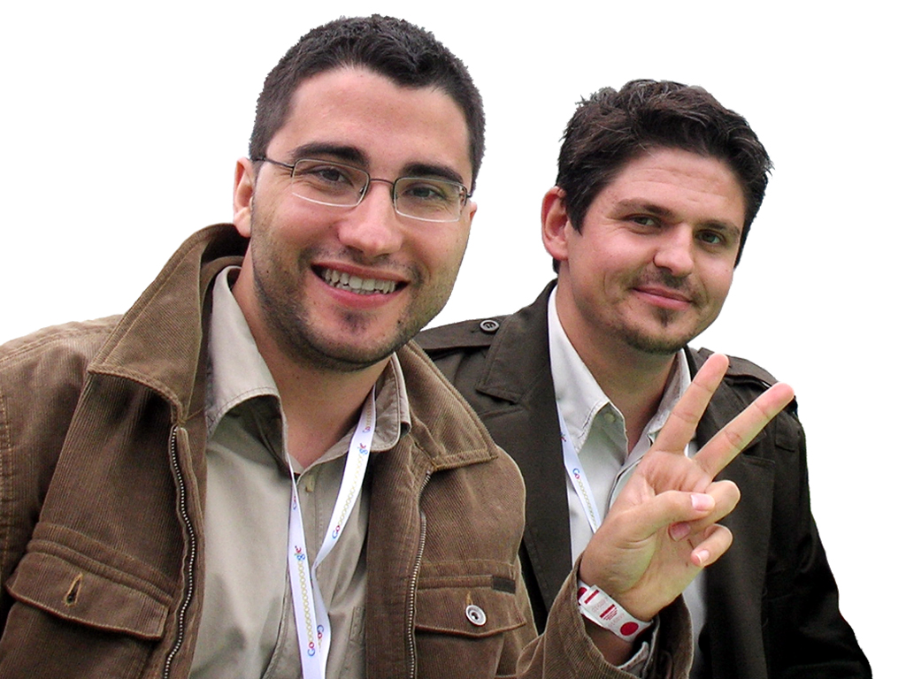 Joaquín Cuenca y Eduardo Manchón, empresarios españoles y creadores del sitio web . (fondo removido con Photosop 7).